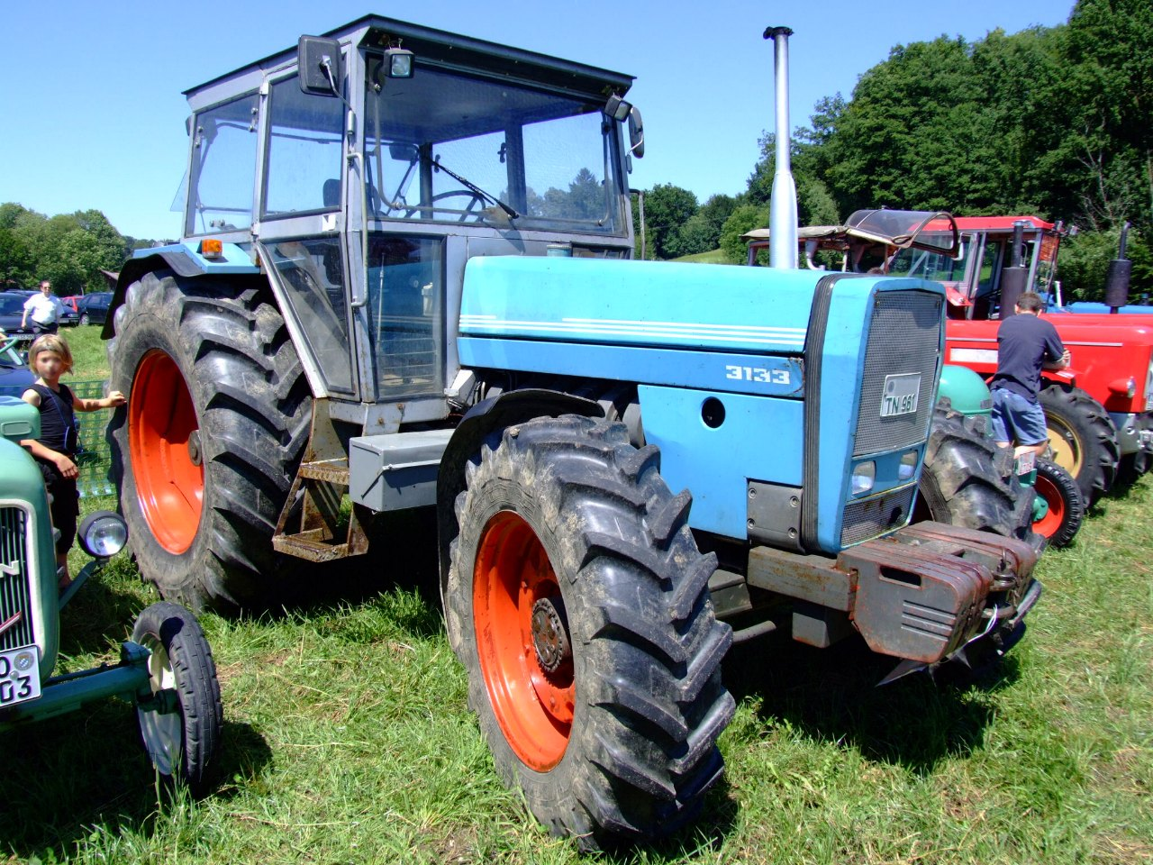 Eicher 3133 133PS 1975